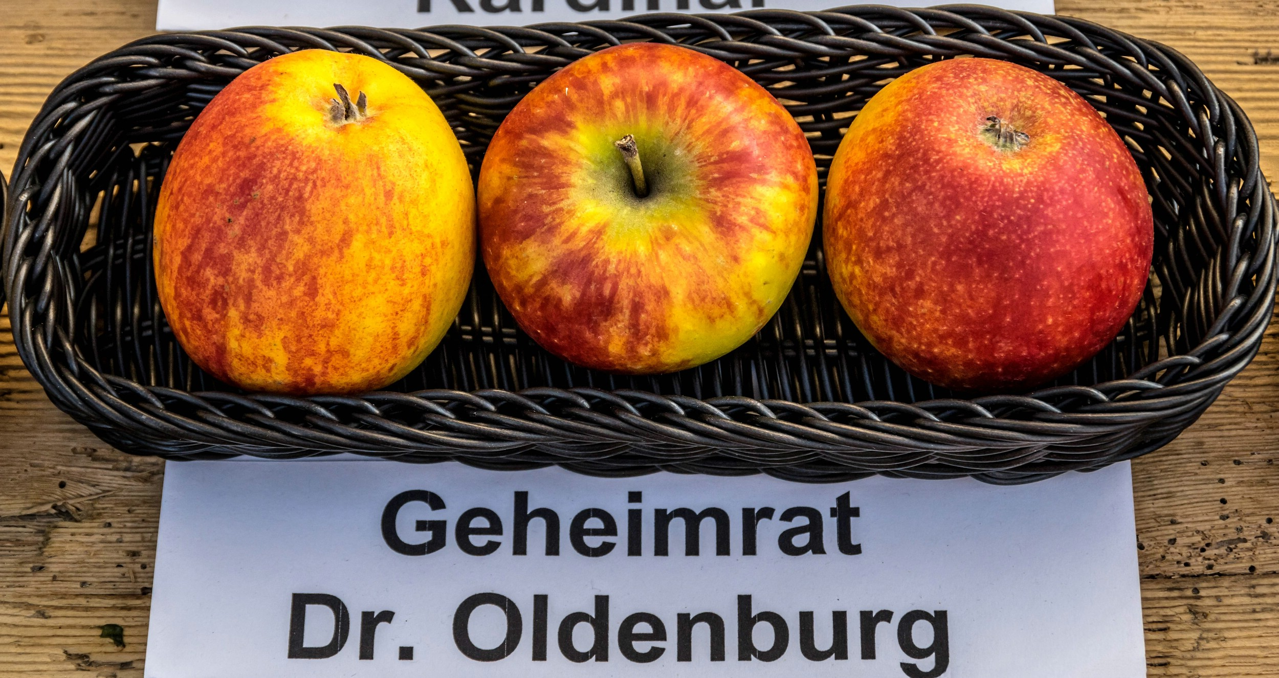 Alte Apfelsorten, von denen es im Badischen noch tragende Bäume gibt. Alle Aufnahmen au dem Oktober 2015